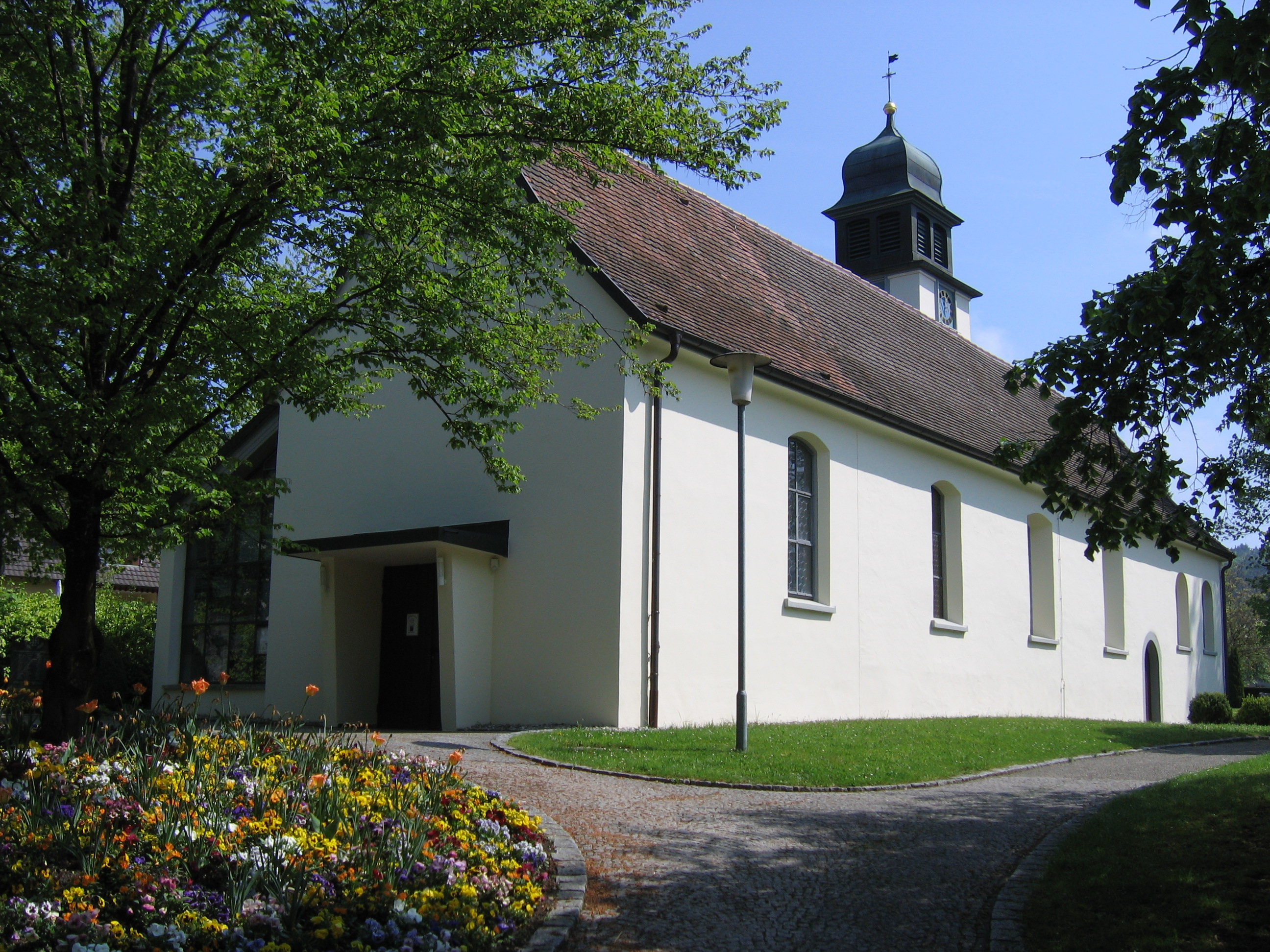 Deutschland - Baden-Württemberg - Bodenseekreis - Überlingen - Nesselwangen: Kirche "St. Peter und Paul"